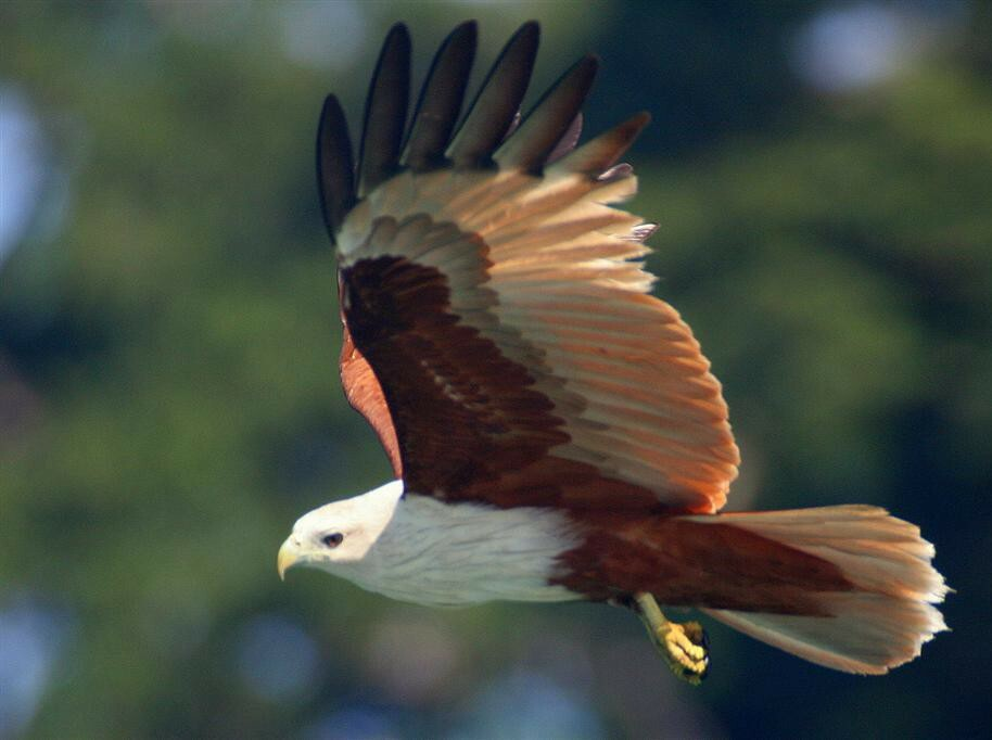 Brahminy Kite (Haliastur indus)